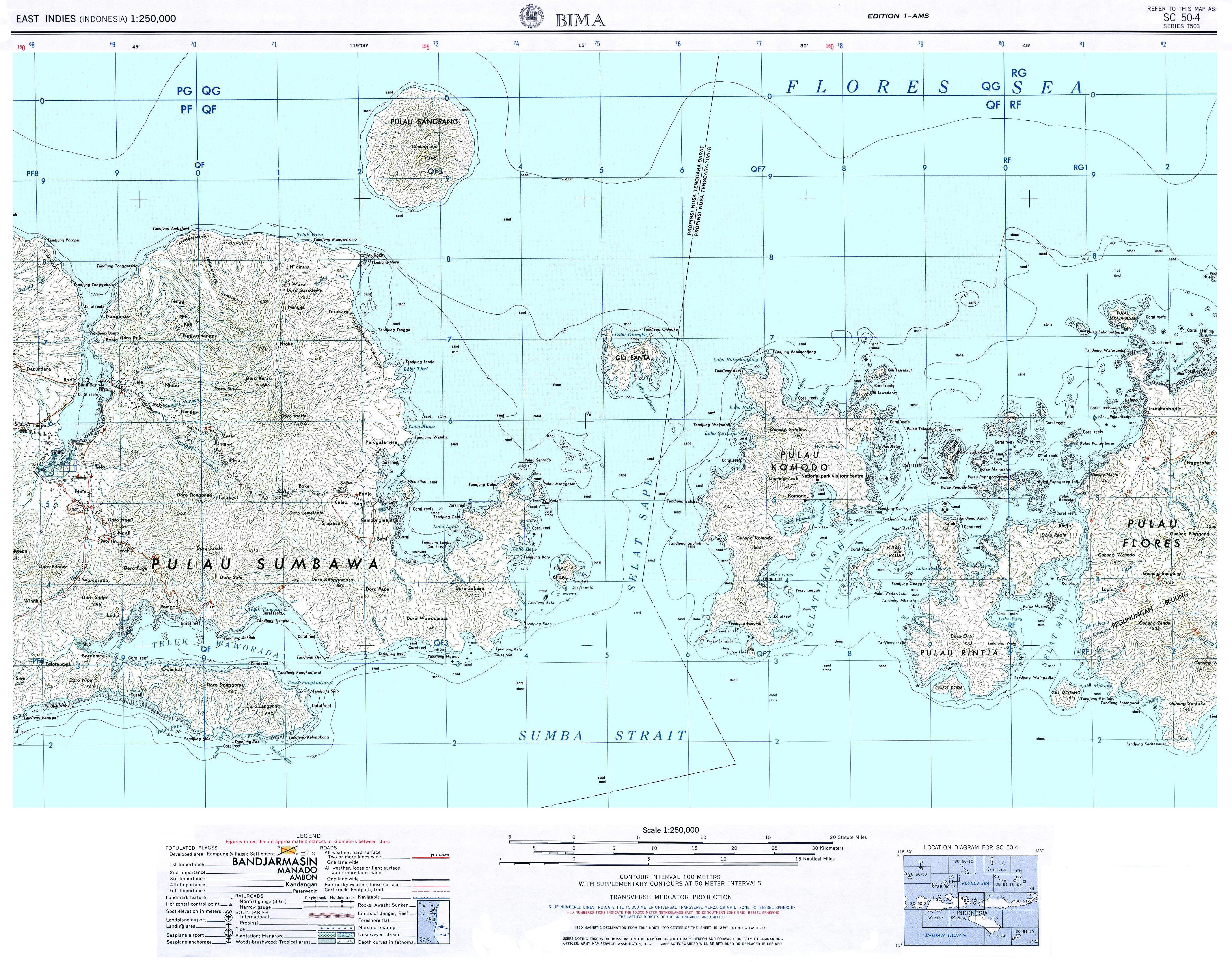 Komodo - Padar - Rinca.